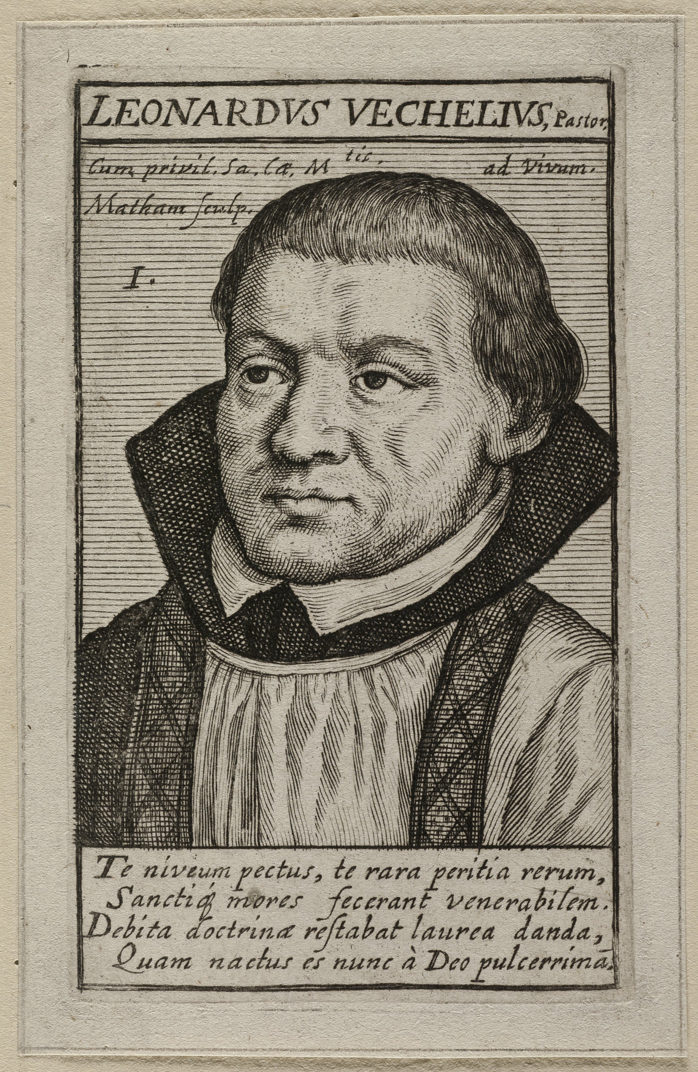 CollectieVoorhelm SchneevoogtInventarisnummerNL-HlmNHA_1477_53010720BeschrijvingDe heilige Leonard van Veghel .Eerste prent uit een genummerde, twintigdelige prentenserie getiteld 'De Martelaren van Gorcum'.Gravure door en uitgave van Jacob Matham, gesigneerd, linksboven genummerd '1'.FotonummerNL-HlmNHA_1477_53010720DocumenttypeHistorieprenten, tekeningen en foto'sPortrettenVervaardigerMatham, Jacob (1571-1631) UitgeverMatham, Jacob (1571-1631)Begindatum1617Einddatum1618TechniekGrafiek Drukwerk Trefwoordenheiligen LiteratuurNew Holstein Dutch, Matham, 118-2(2)